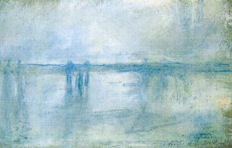 'Charing Cross Bridge, London' van Claude Monet (1901). Foto AP - Politie R'dam